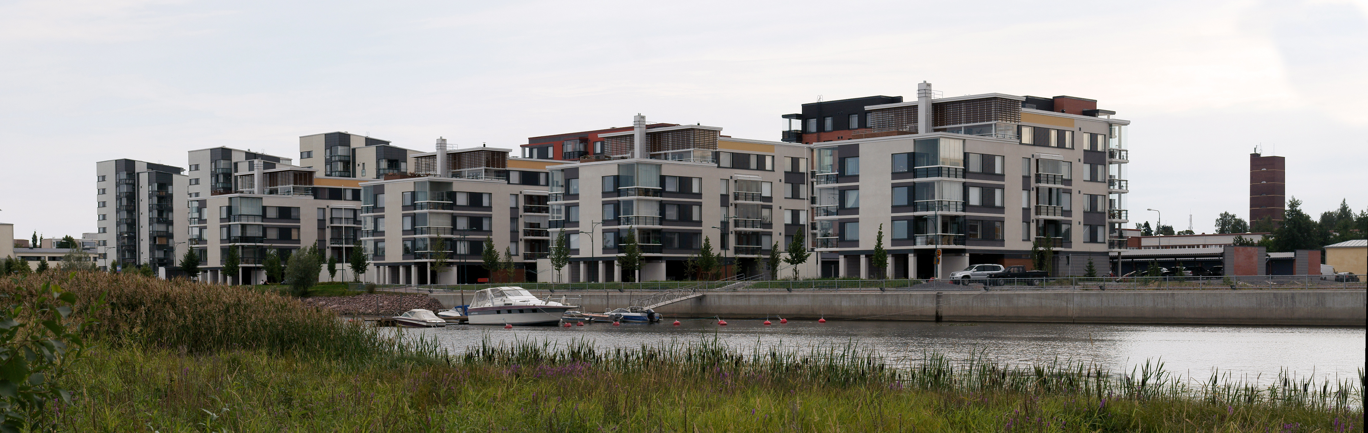 Porin Karjarantaa Polsanluodosta kuvattuna.